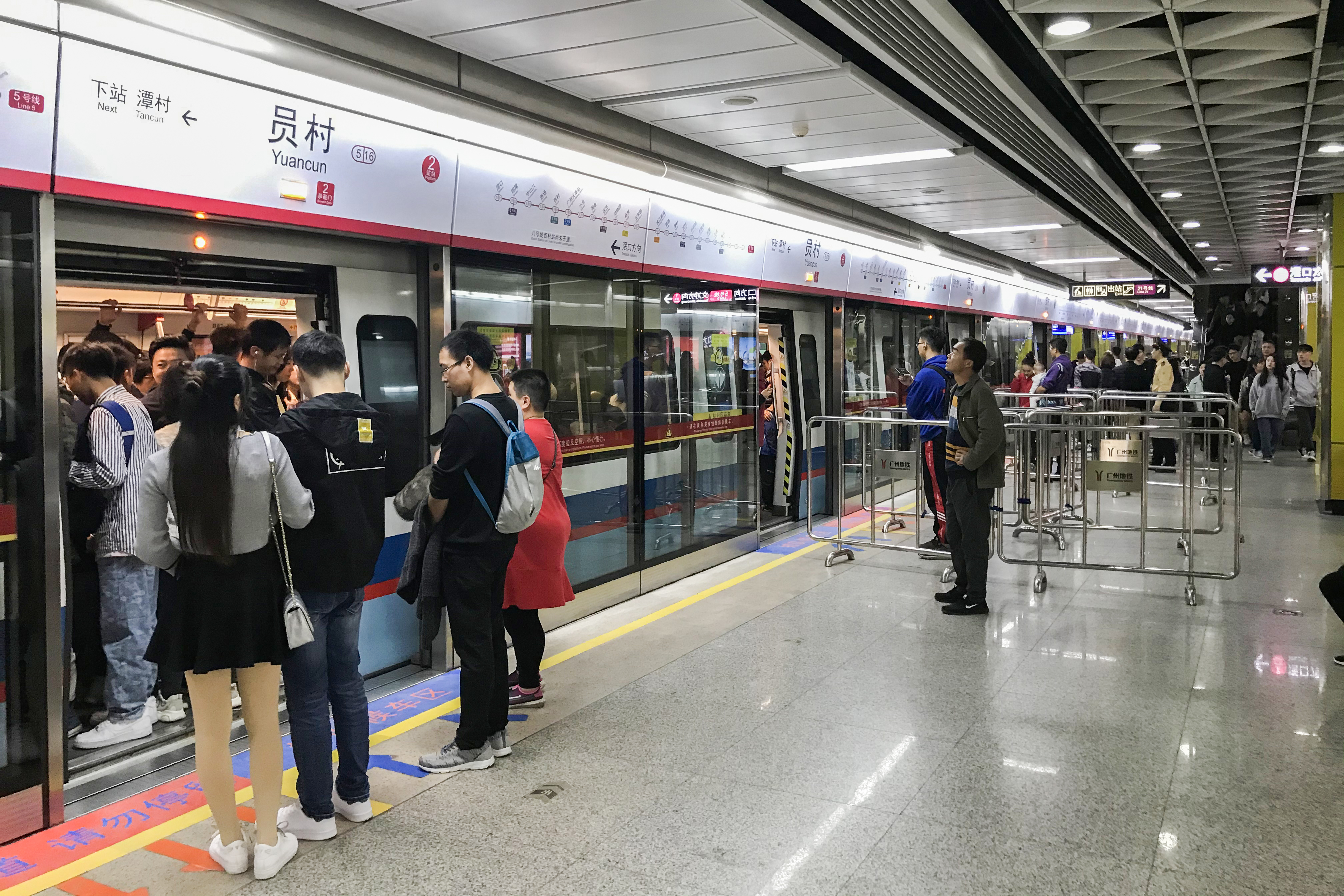 广州地铁员村站